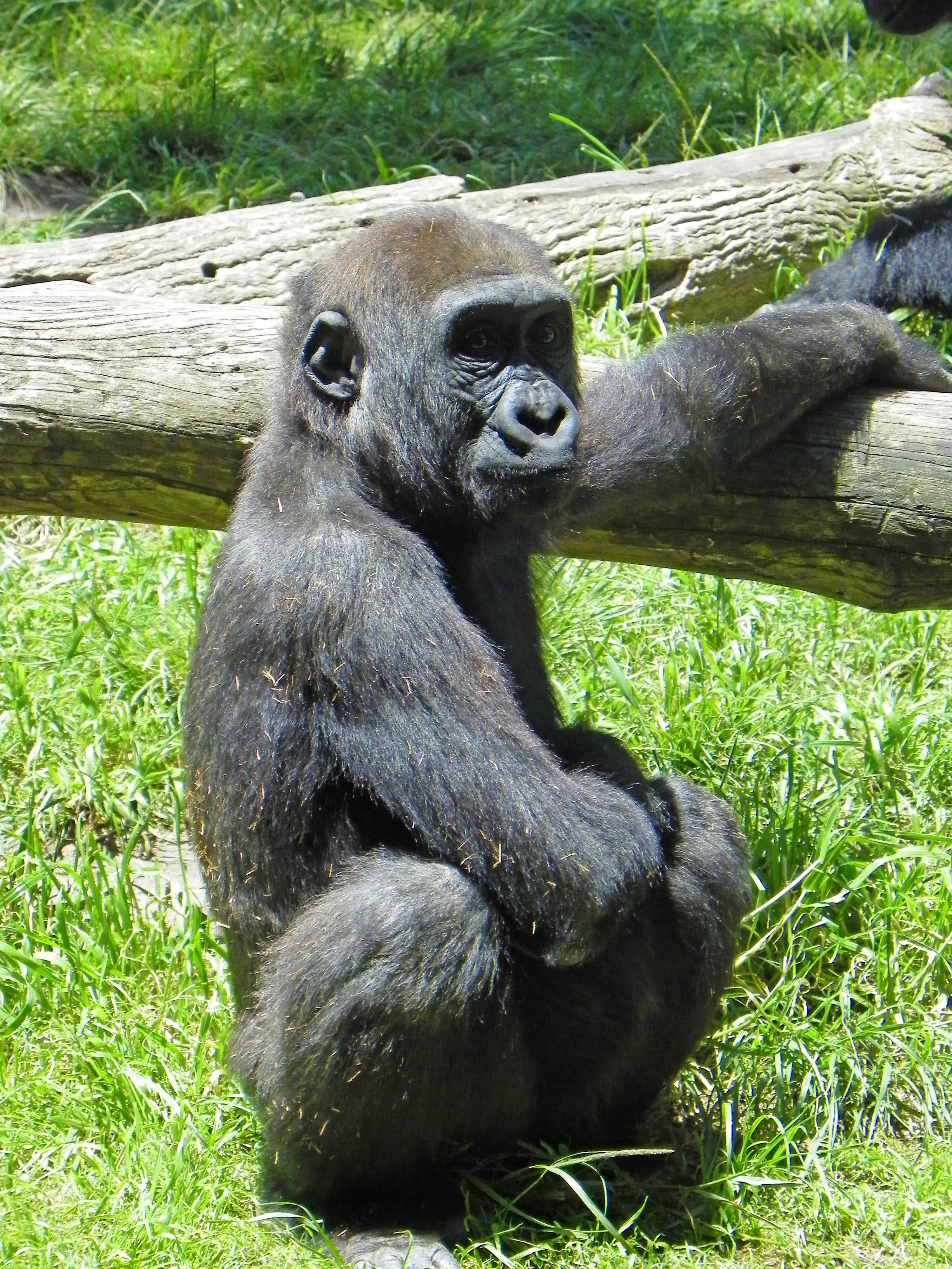 A young gorilla at the San Diego Zoo.